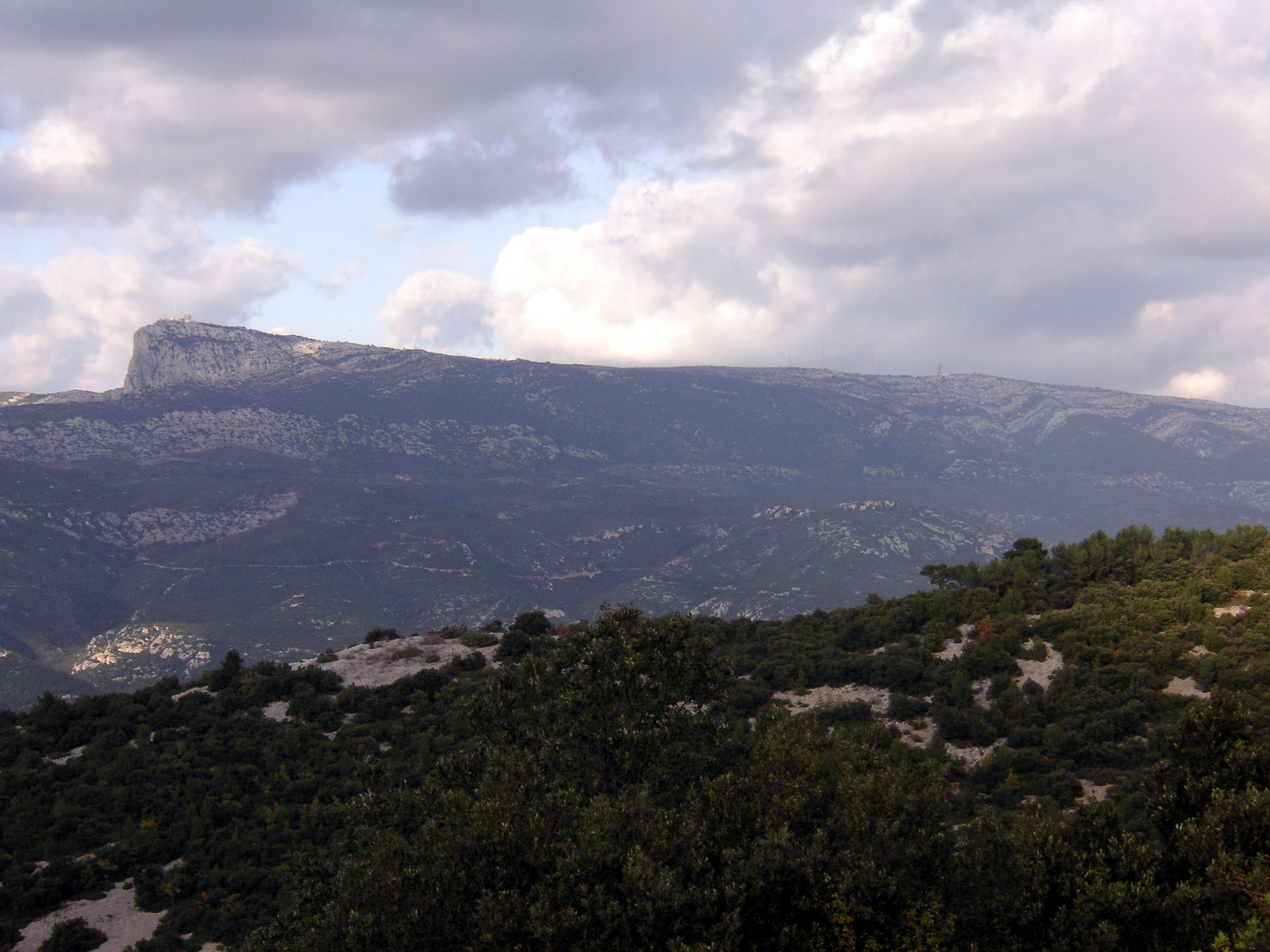 Massif de la Sainte-Baume dans le département du Var (France)